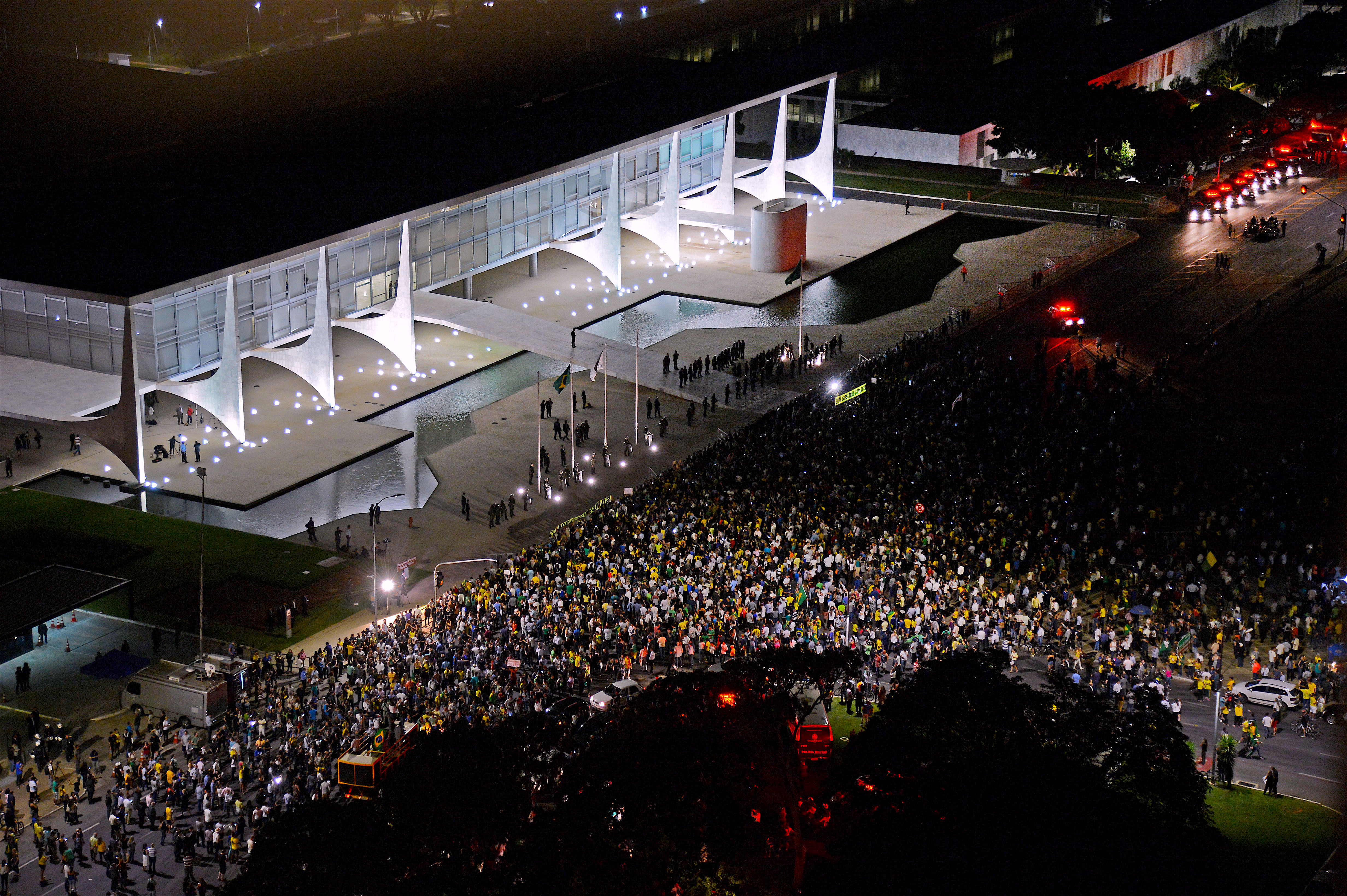 Protesto contra a nomeação do ex-presidente Lula como ministro da Casa Civil, em frente ao Palácio do Planalto.